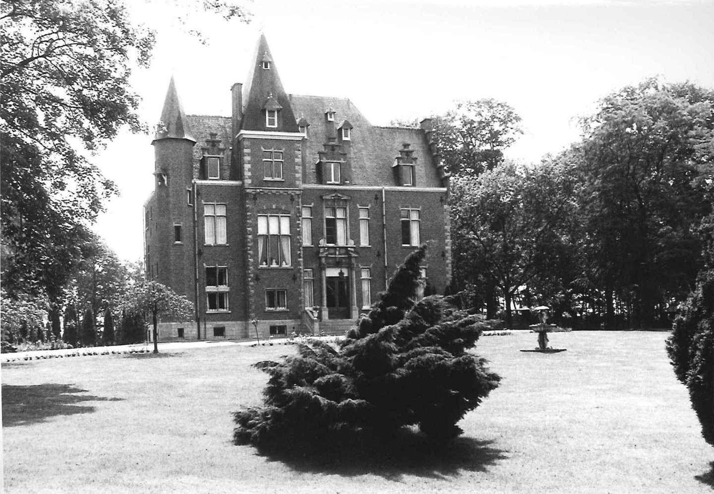 Destelbergen Destelbergen Walbosdreef 12